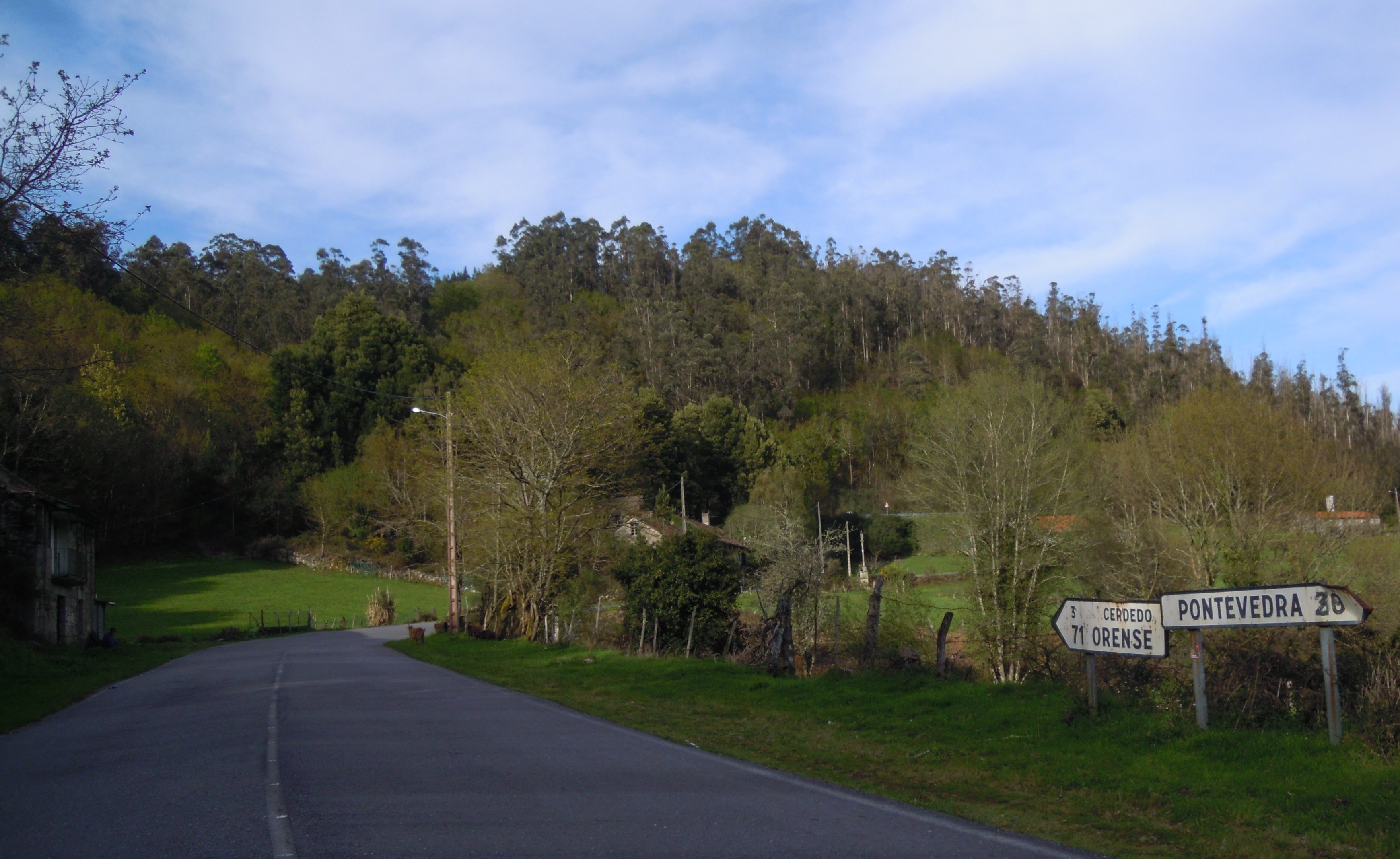 Sinais de tráfico en Vichocuntín (Pedre, Cerdedo-Cotobade) ao pé dun tramo xa en desuso da estrada N-541